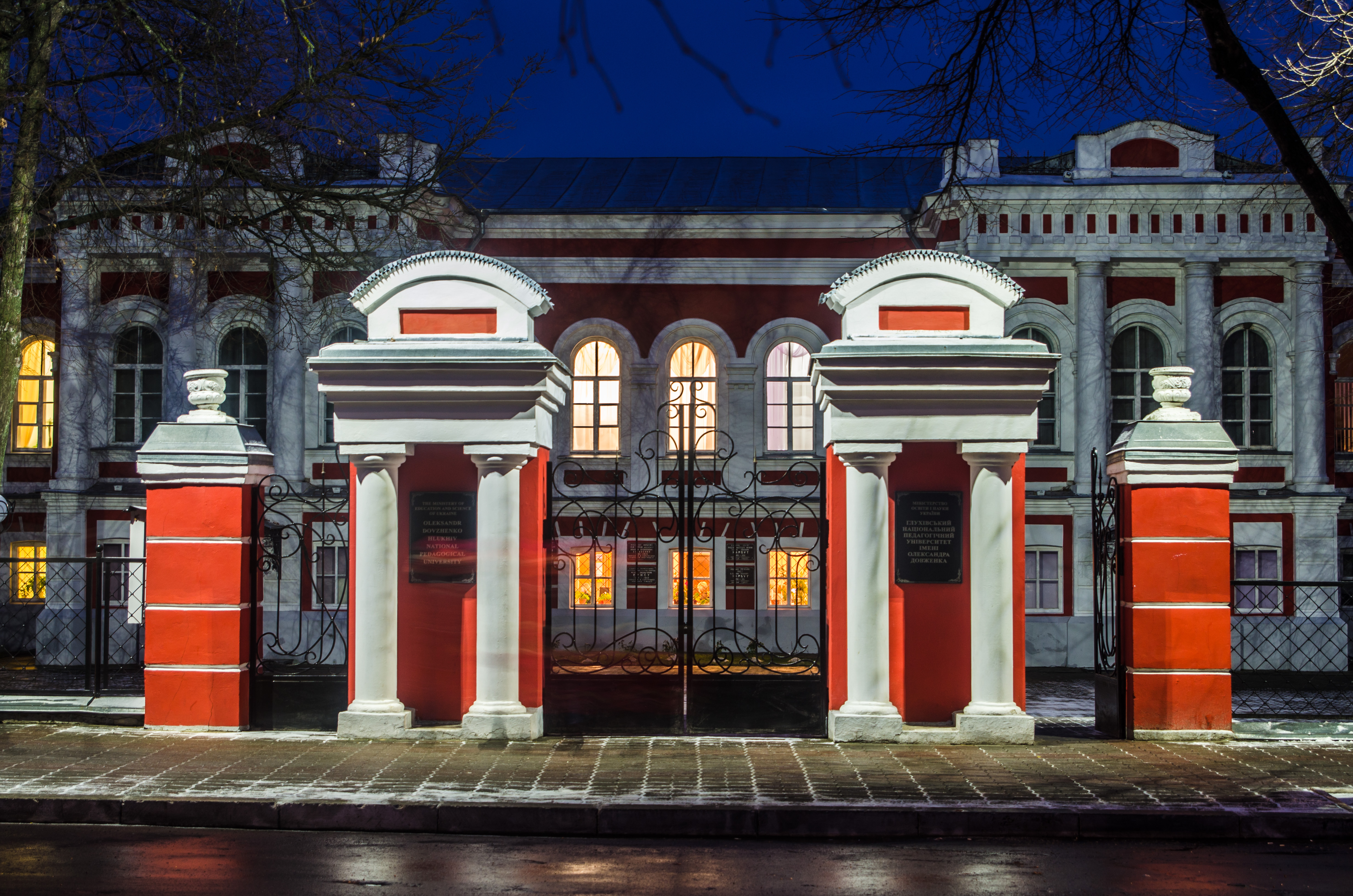 Гуманітарно-просвітницький комплекс, Глухів, вул. Києво-Московська, 24